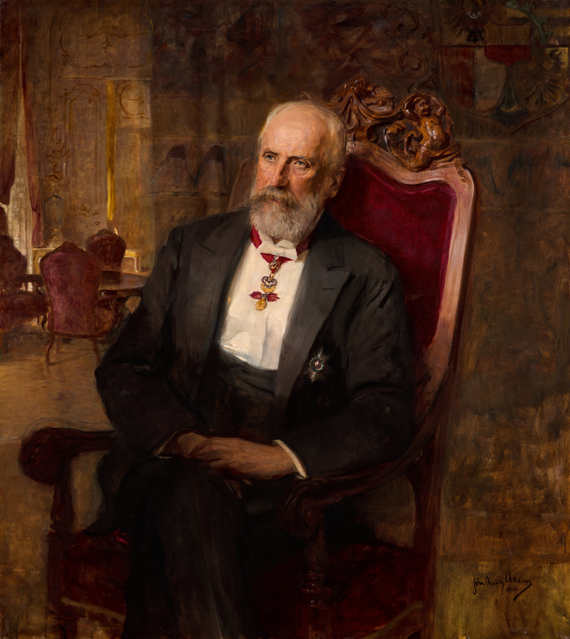 Johannes II van Liechtenstein door Weens portretschilder John Quincy Adams.